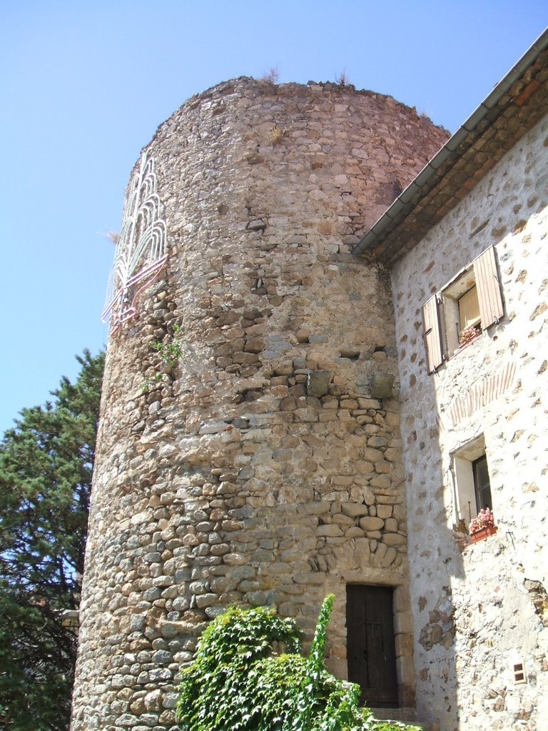 Amélie-les-Bains-Palalda, village médiéval de Palalda (Pyrénées-Orientales, Languedoc-Roussillon, France) : tour fortifiée cylindrique, vestige des fortifications de Guillaume-Hugues de Serralonga (vers 1254-1260).